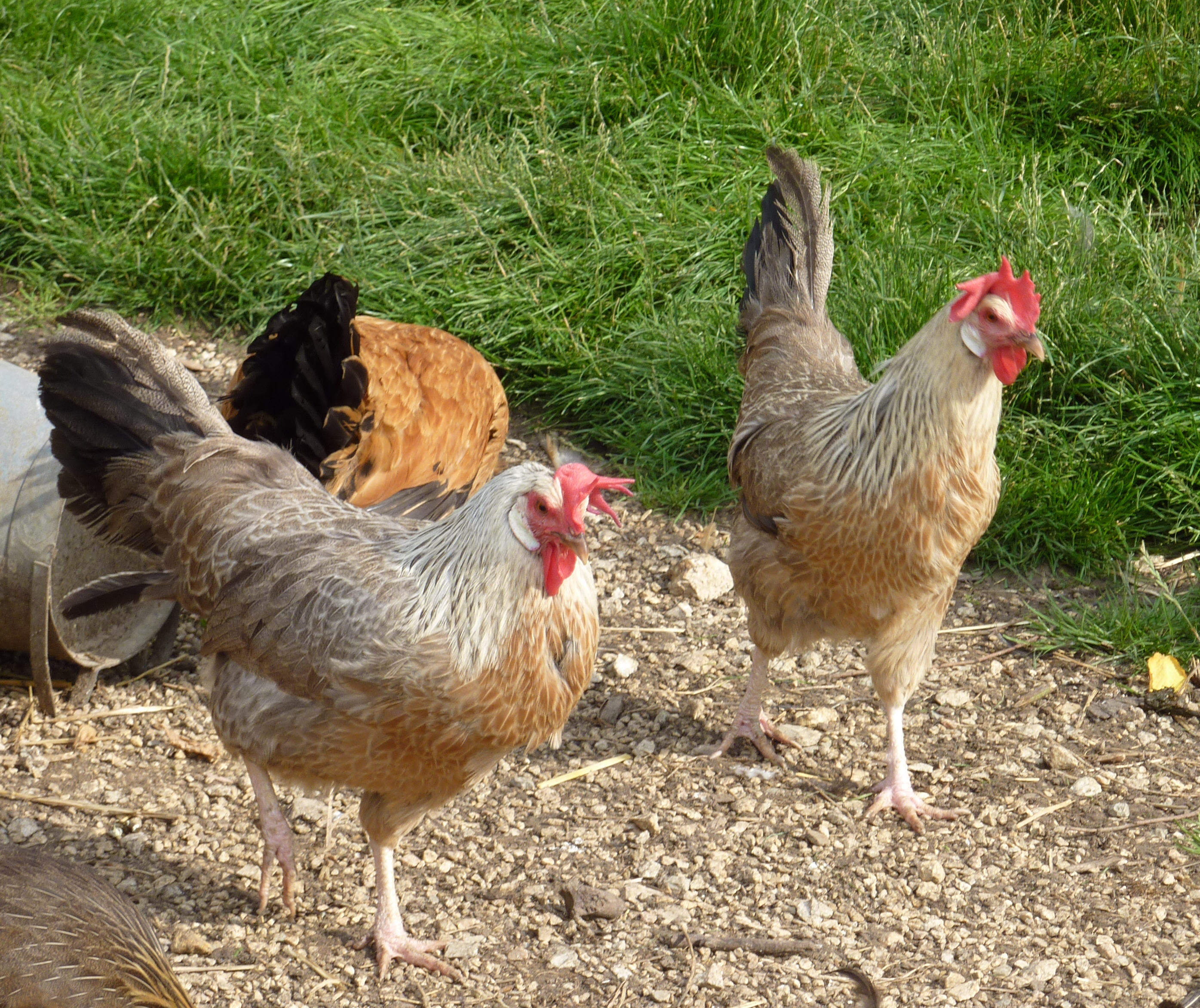 Italiener